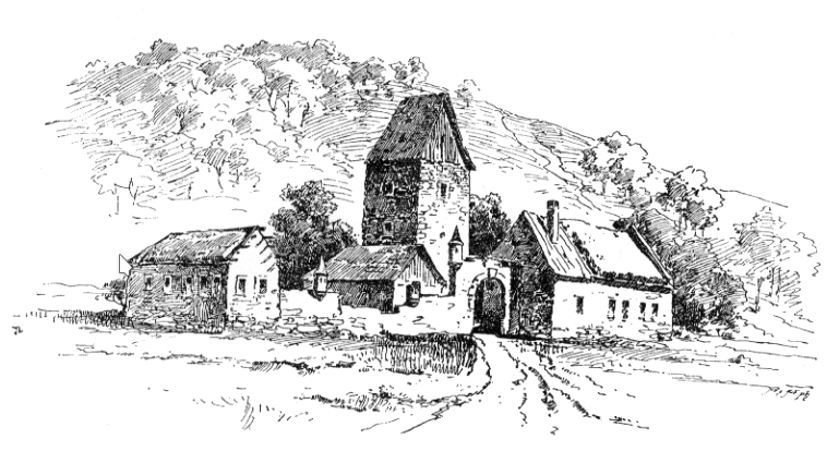 Kouskova Lhota v 18. století – kresba J. Kaisra podle fresky na zámku v Týnci na Klatovsku